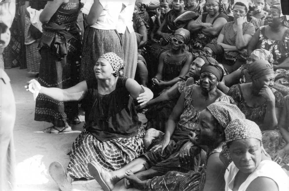 Afrikanska kvinnor sörjer Togos mördade president Sylvanus Olympio.